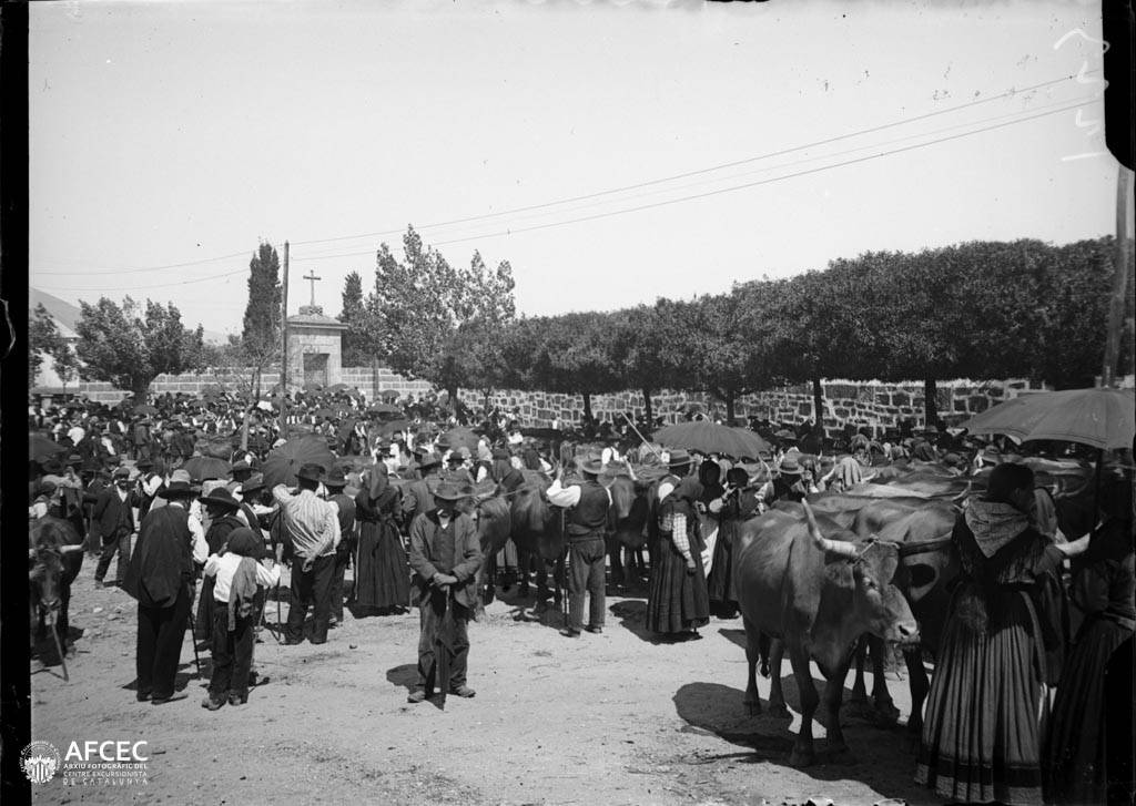 Imatge